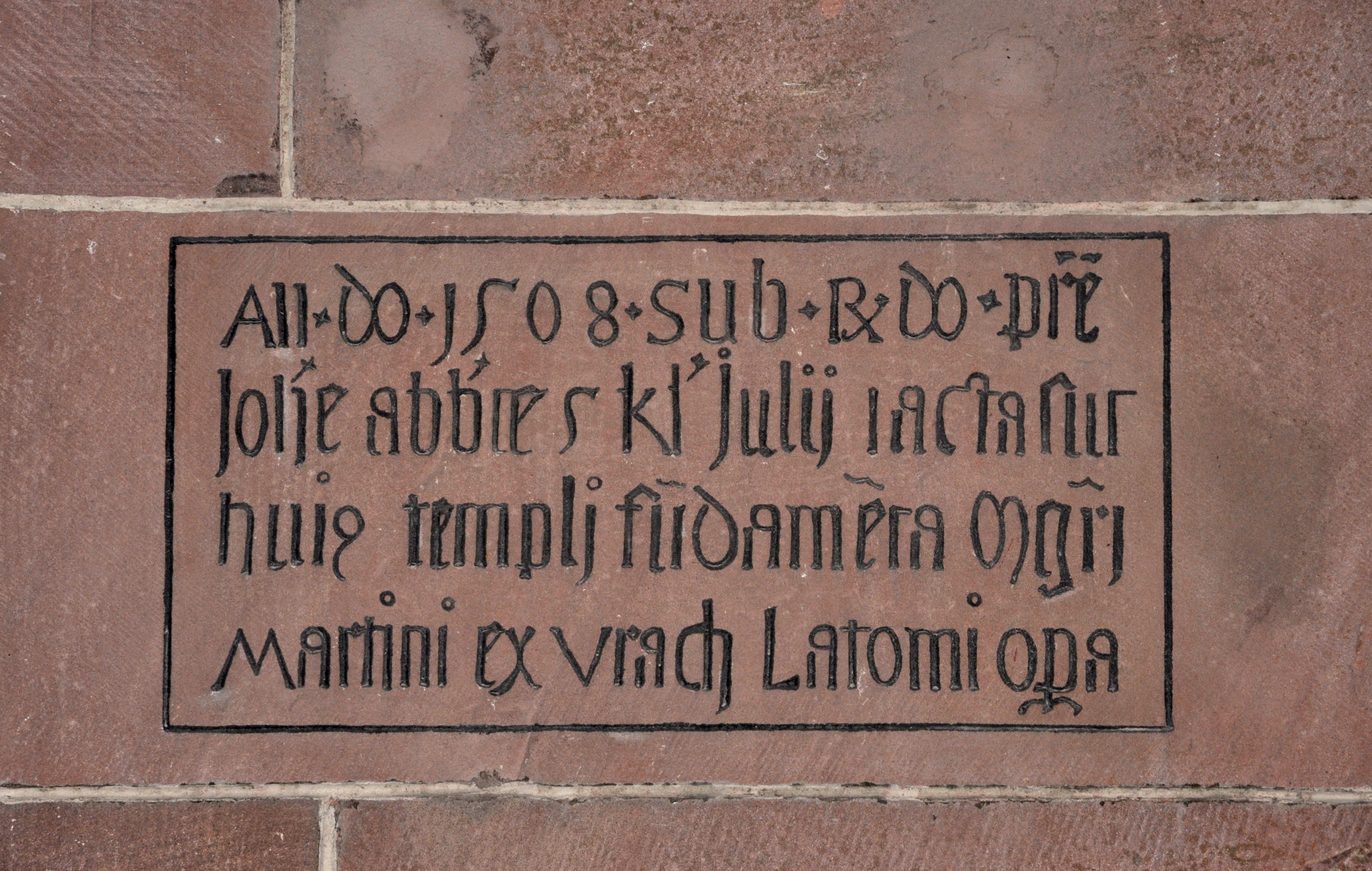 Inschrift Marienkapelle, Kloster Hirsau